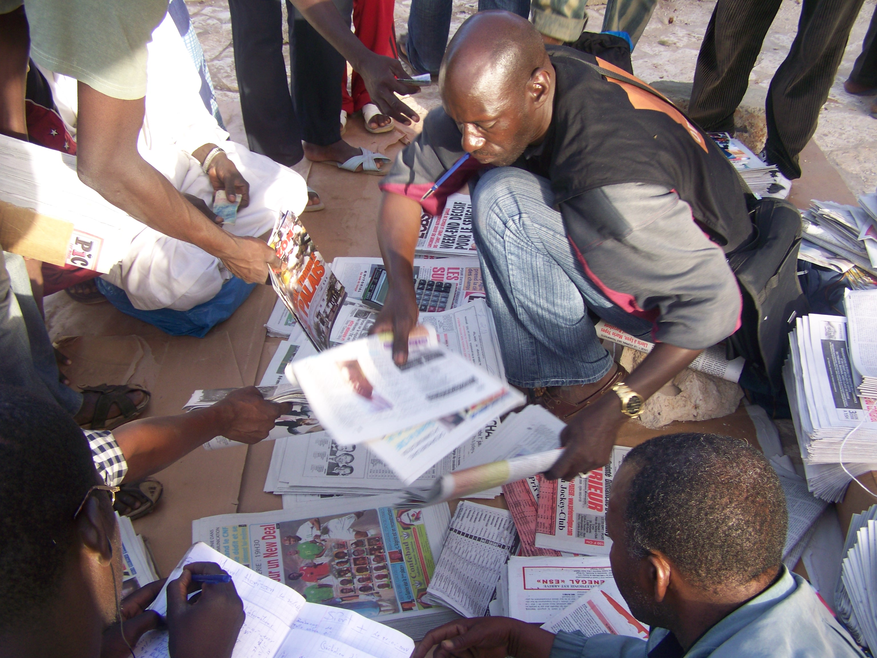 Vendeur de journaux à Dakar ( senegal )